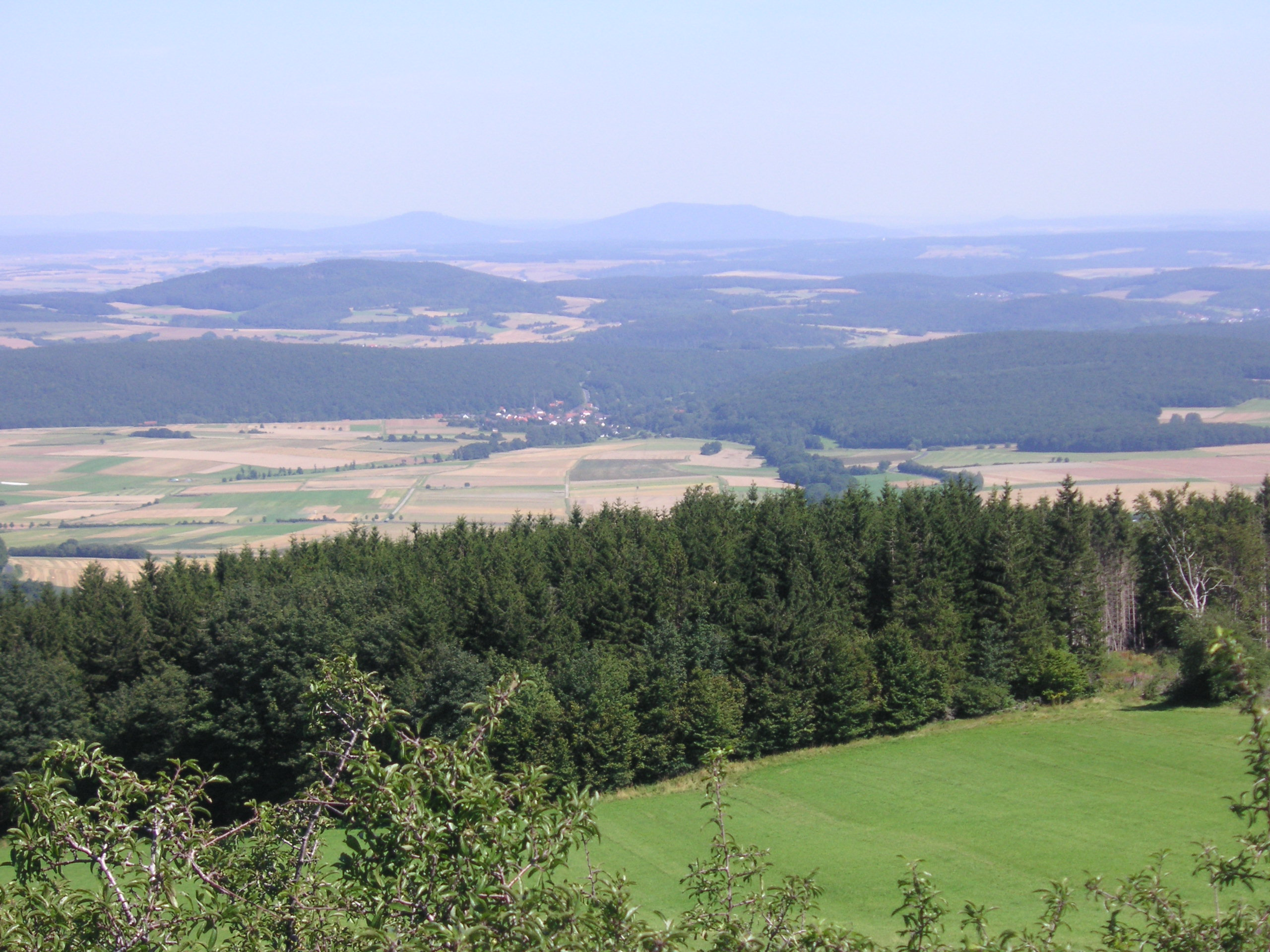 In der südlichen Langen Rhön auf dem Naturkundlichen Wanderpfad Bauersberg - Blick von der Kalten Buche auf die östliche Vor-Rhön, das Dorf in der Bildmitte ist Ginolfs, im Hintergrund sind die thüringischen Gleichberge zu sehen